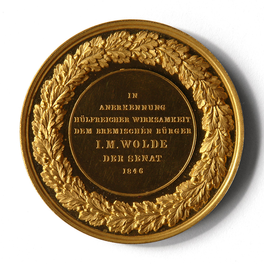 Focke-Museum Bremen: Bremische Ehrenmedaille in Gold von 1846 (Rückseite). Verliehen an den Geldmakler Johann Martin Wolde für Verdienste um die Wunstorf–Bremer Eisenbahn Focke-Museum Native nameFocke-MuseumLocationBremen, GermanyCoordinates53° 5′ 33.00″ N, 8° 51′ 51.00″ E Established1918/1959Website